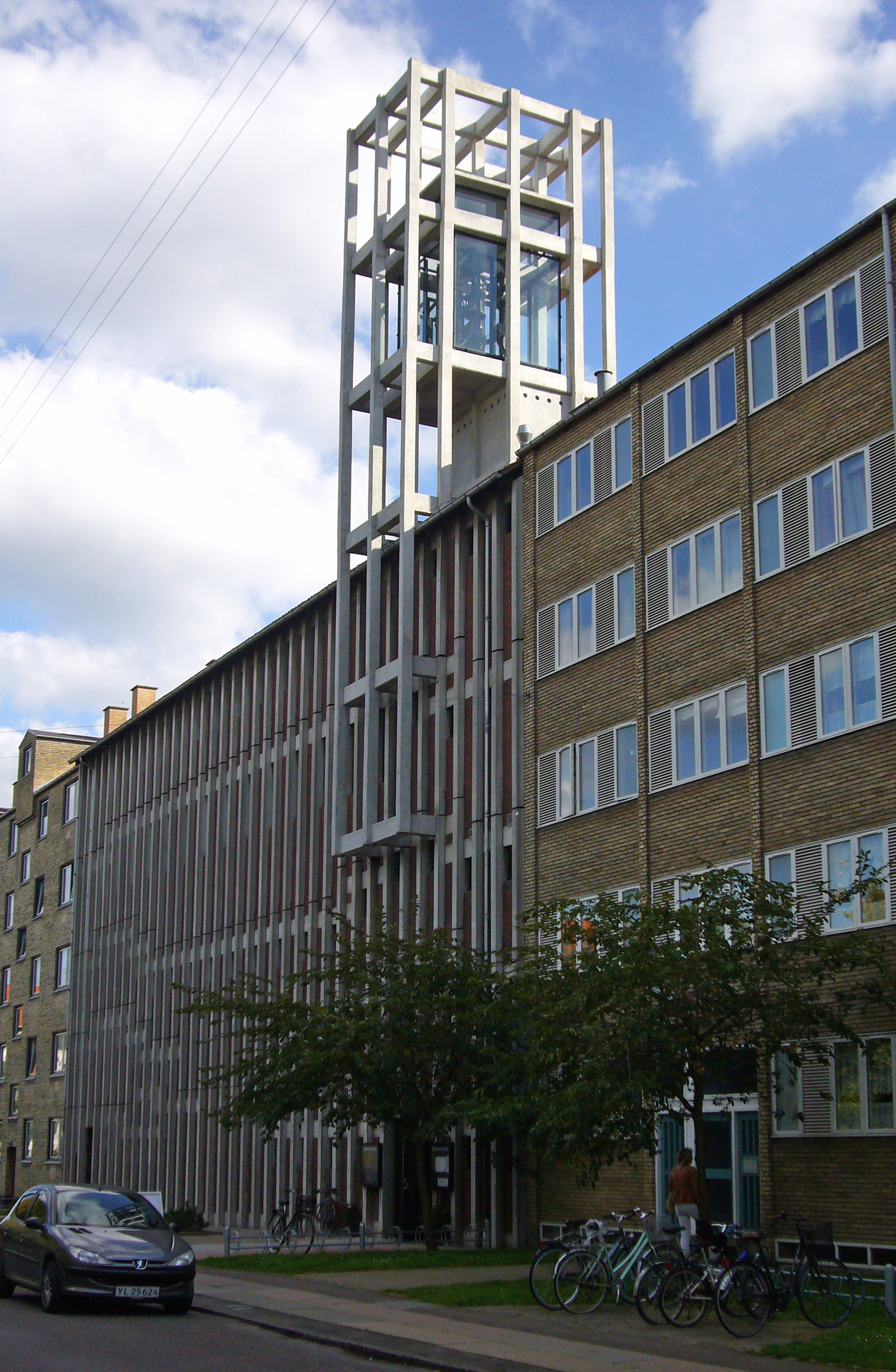 Tagensbo Kirke, Copenhagen, Denmark.